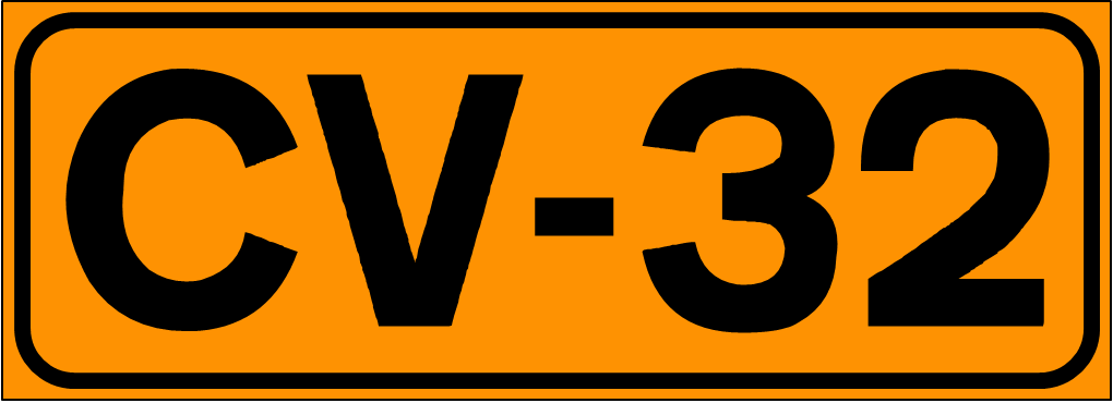 Inidcador de la Carretera de la Comunidad Valenciana CV-32